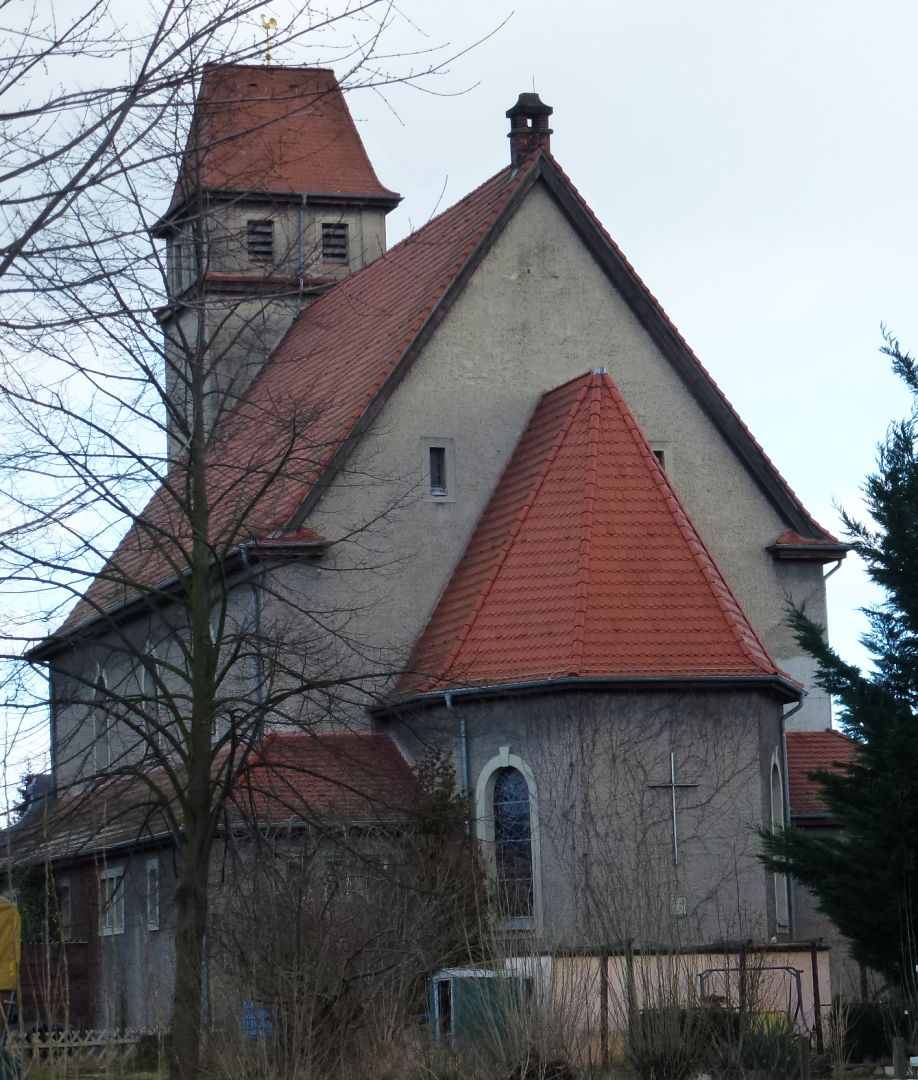 Katholische Heilig-Geist-Kirche in Greppin, Wolfener Straße 58. 1917 eingeweiht, 2017 profaniert.